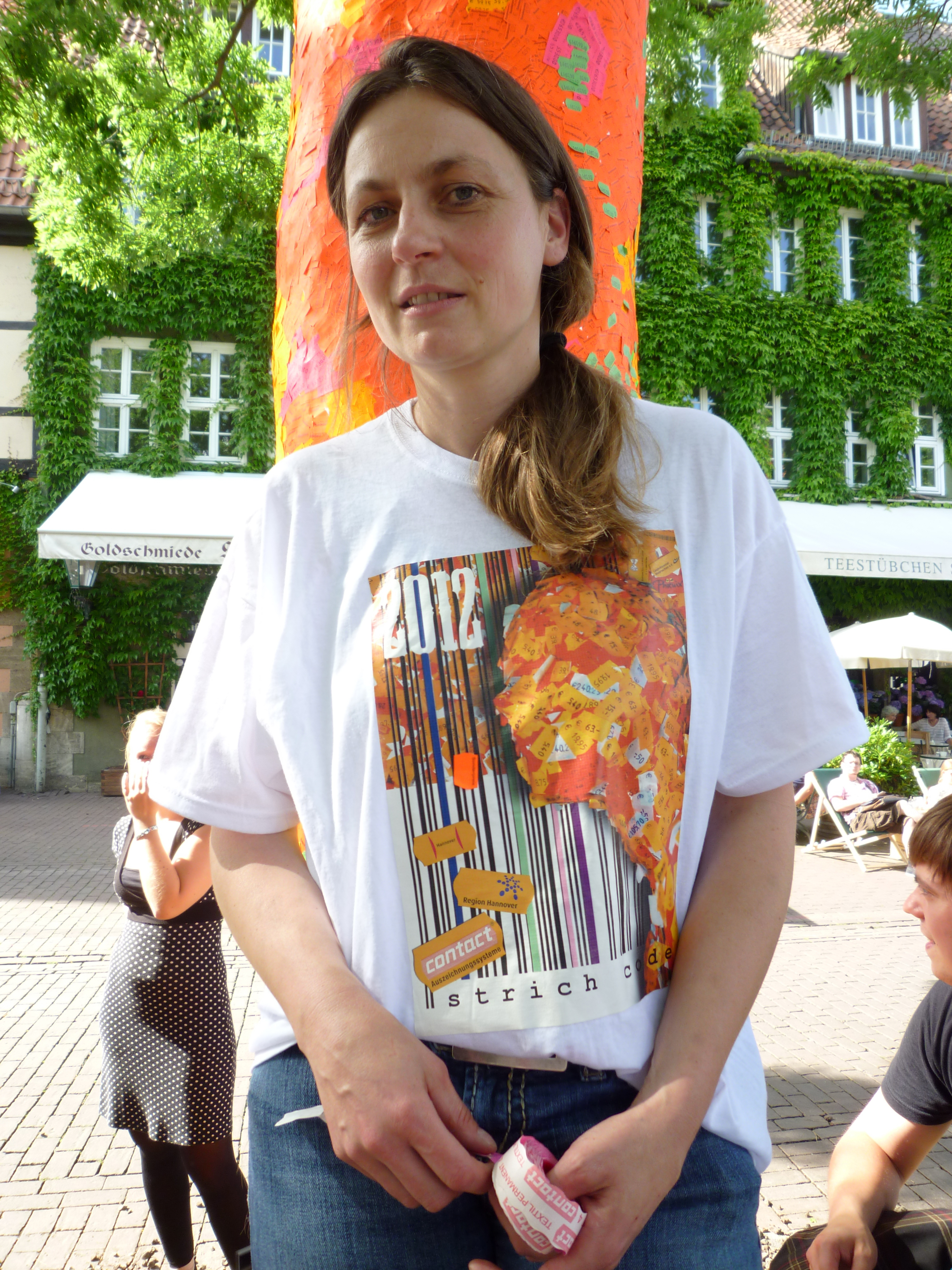 Kerstin Schulz, Künstlerin und Initiatorin von Strich-Code, eine "Schwarmkunstaktion" zur Hinterfragung von käuflicher Sexualität und käuflicher Kunst ...